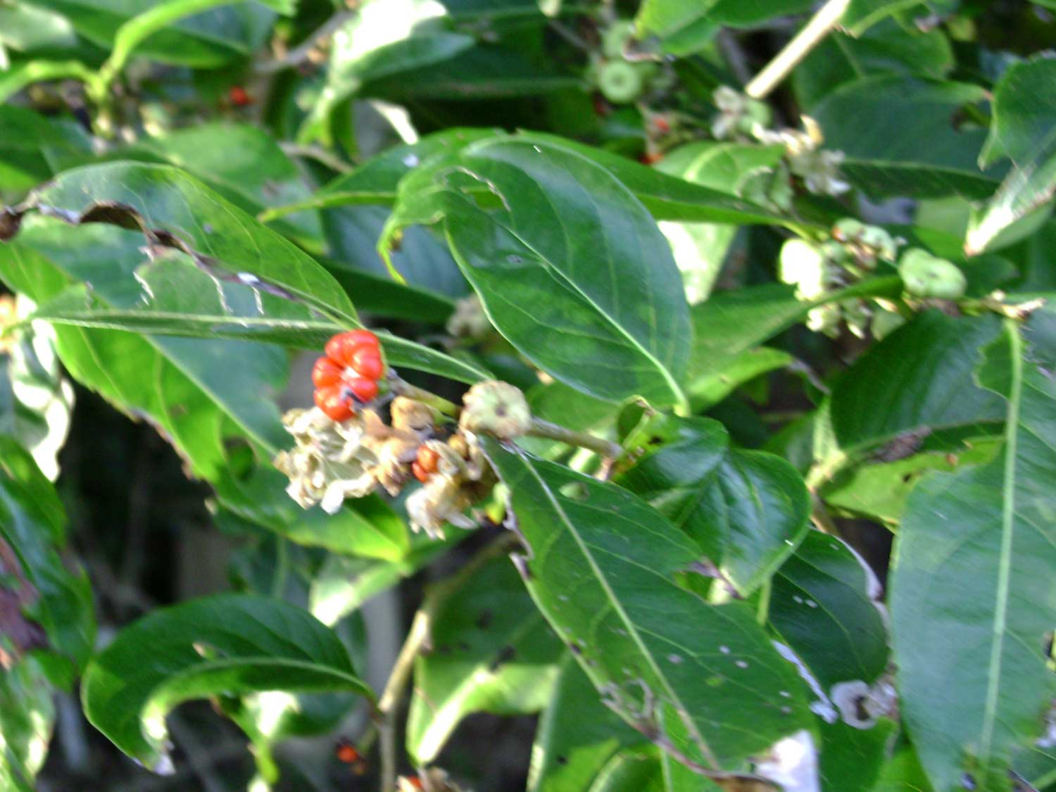 Glochidion ramiflorum, leaves, fruit; (masikoka) in Vavaʻu, Tonga